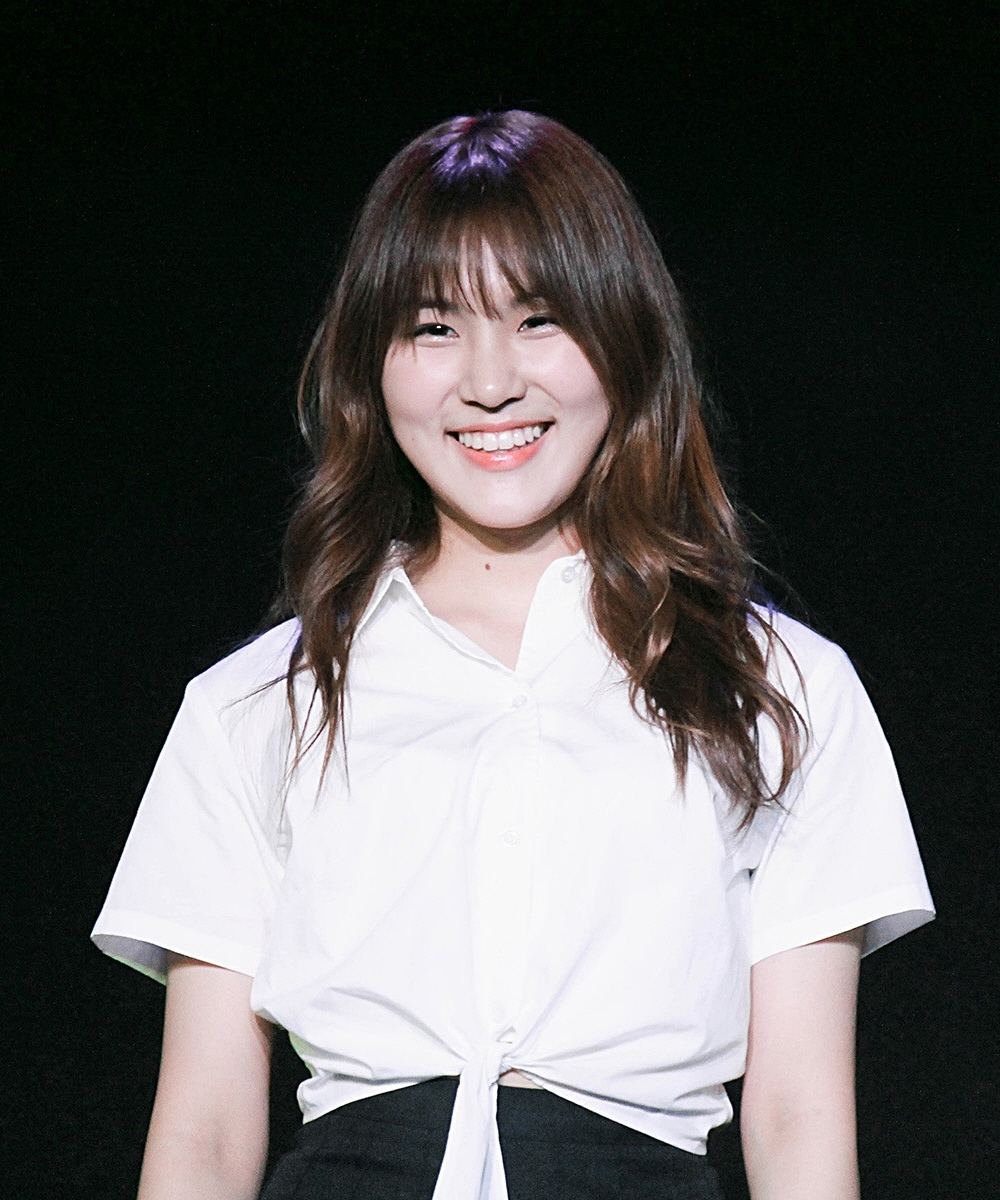 160702 플레디스걸즈 콘서트 김민경 강경원 김예원 배성연 카일라 직찍